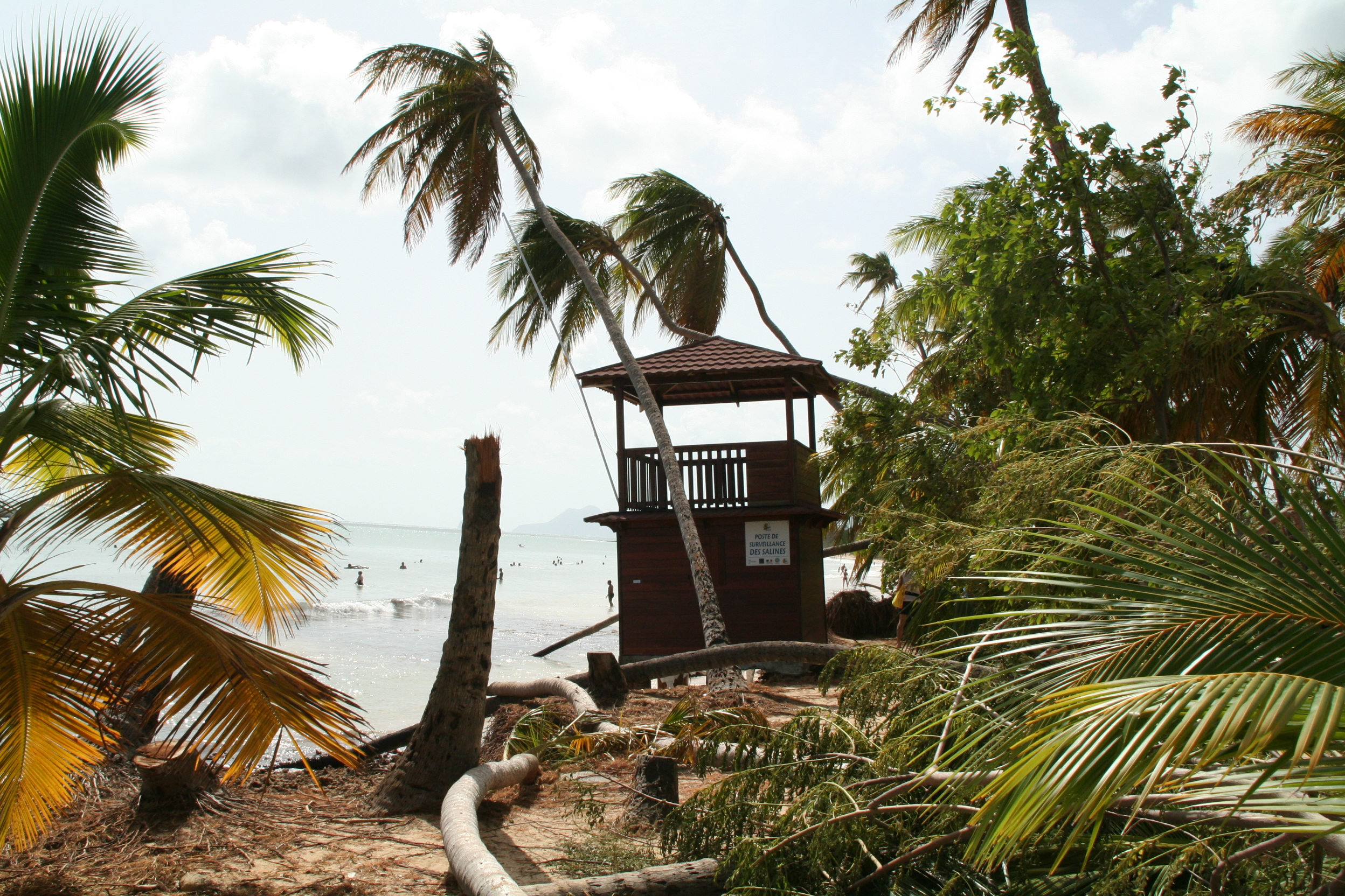 Poste de surveillance de la plage des salines (Martinique) après le cyclone Dean